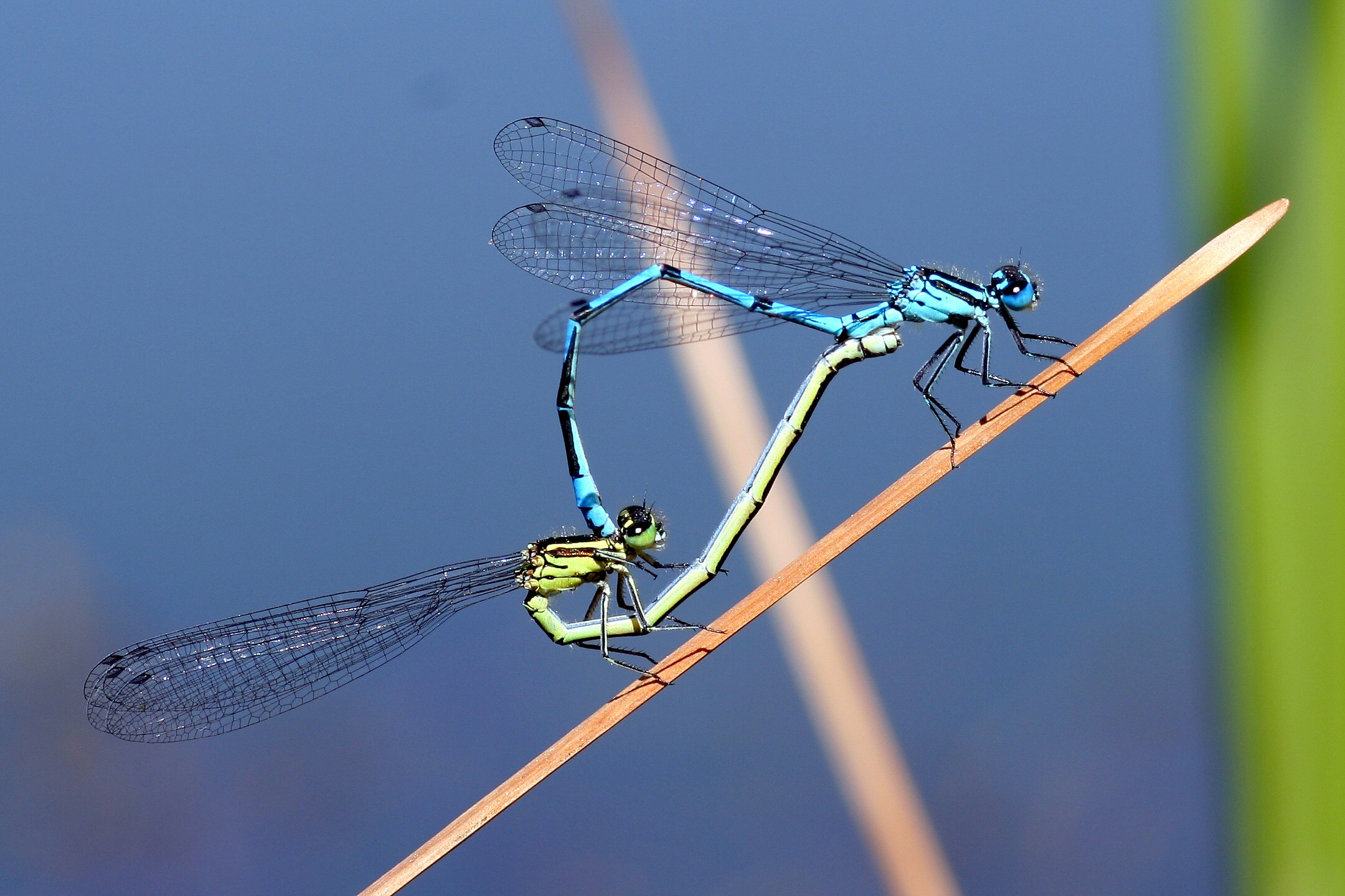 Hufeisen-Azurjungfern (Coenagrion puella)